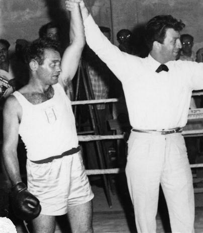 Beersheba